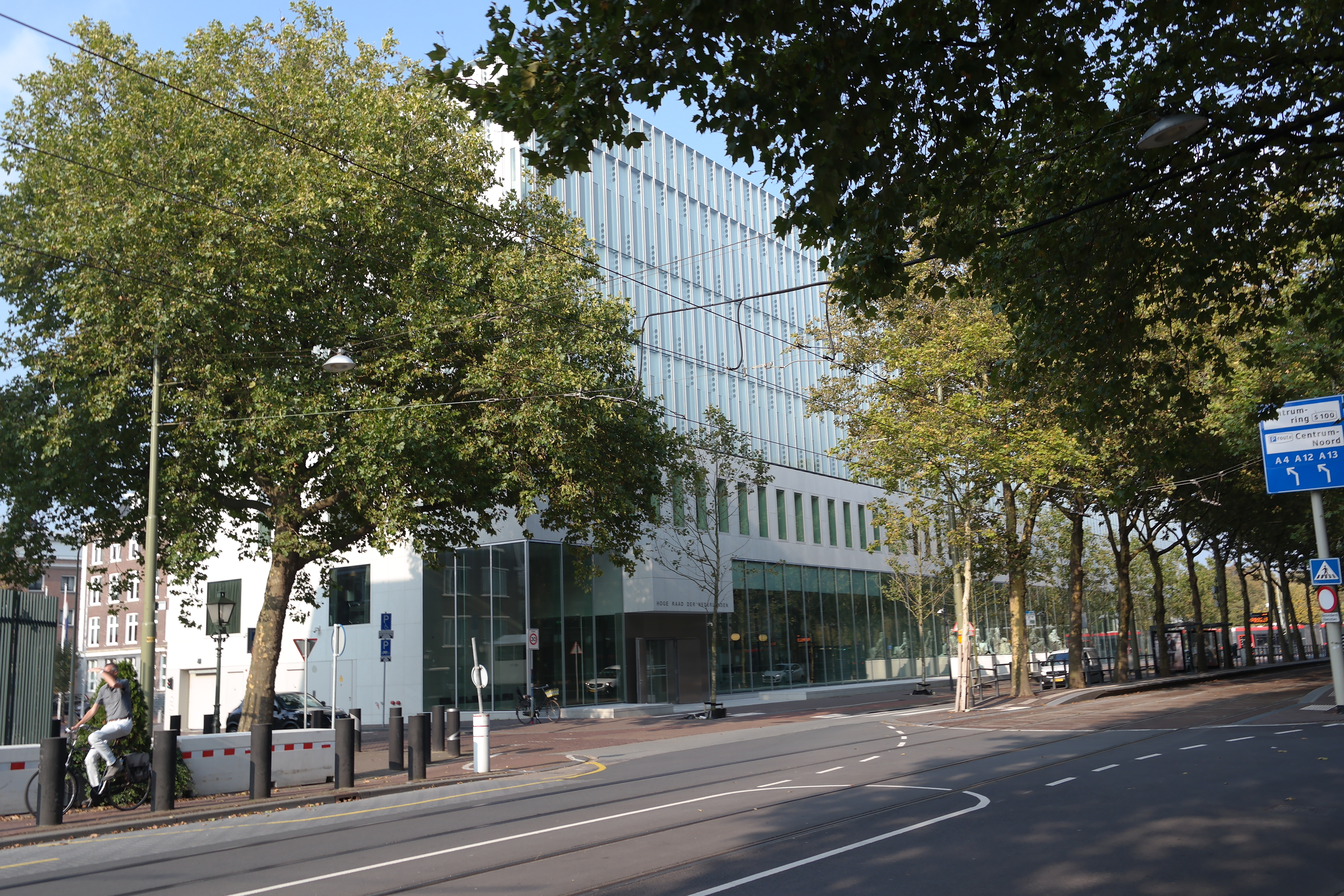 Het pand van de Hoge Raad in Den Haag.